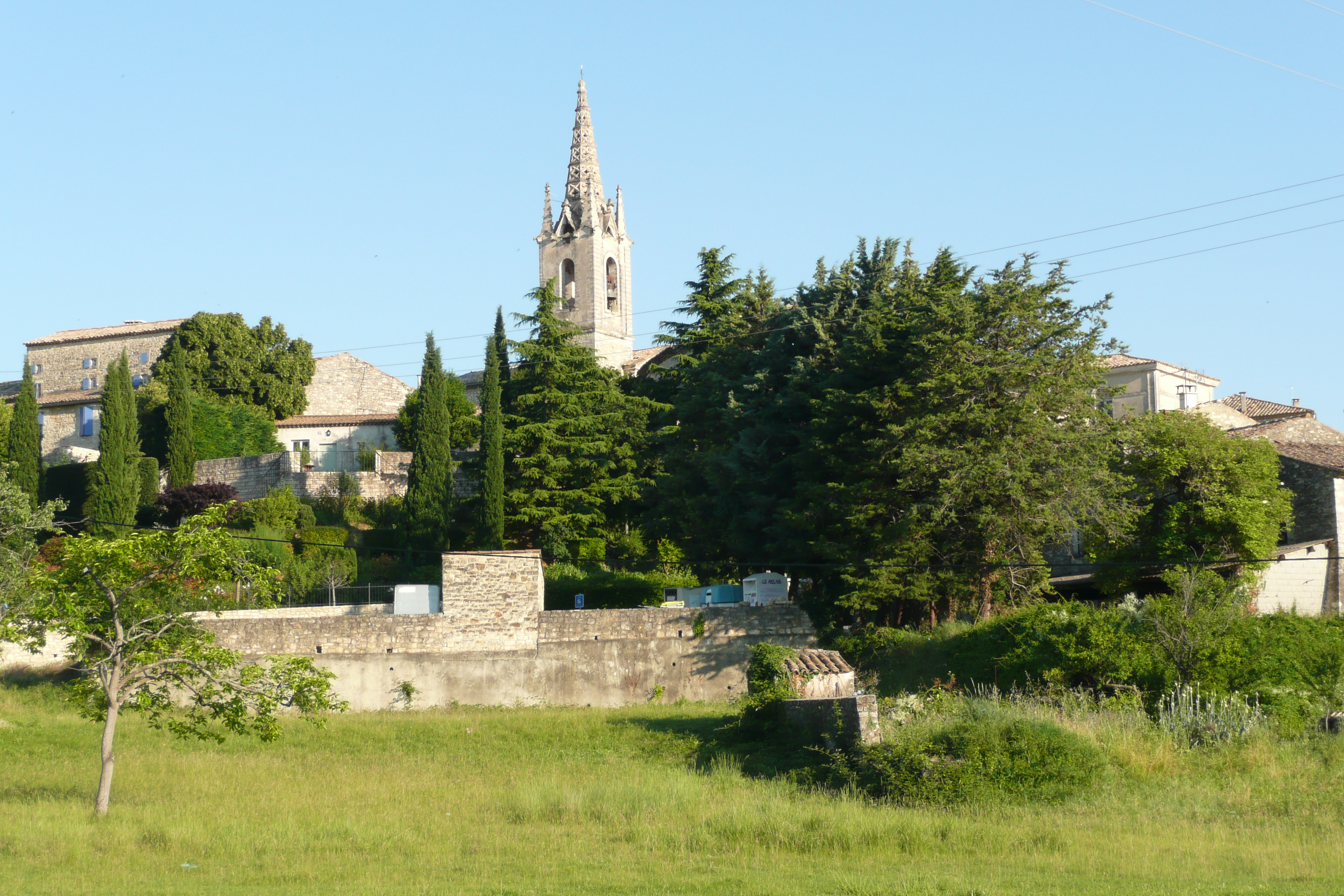 Vue d'ensemble du village Issirac.